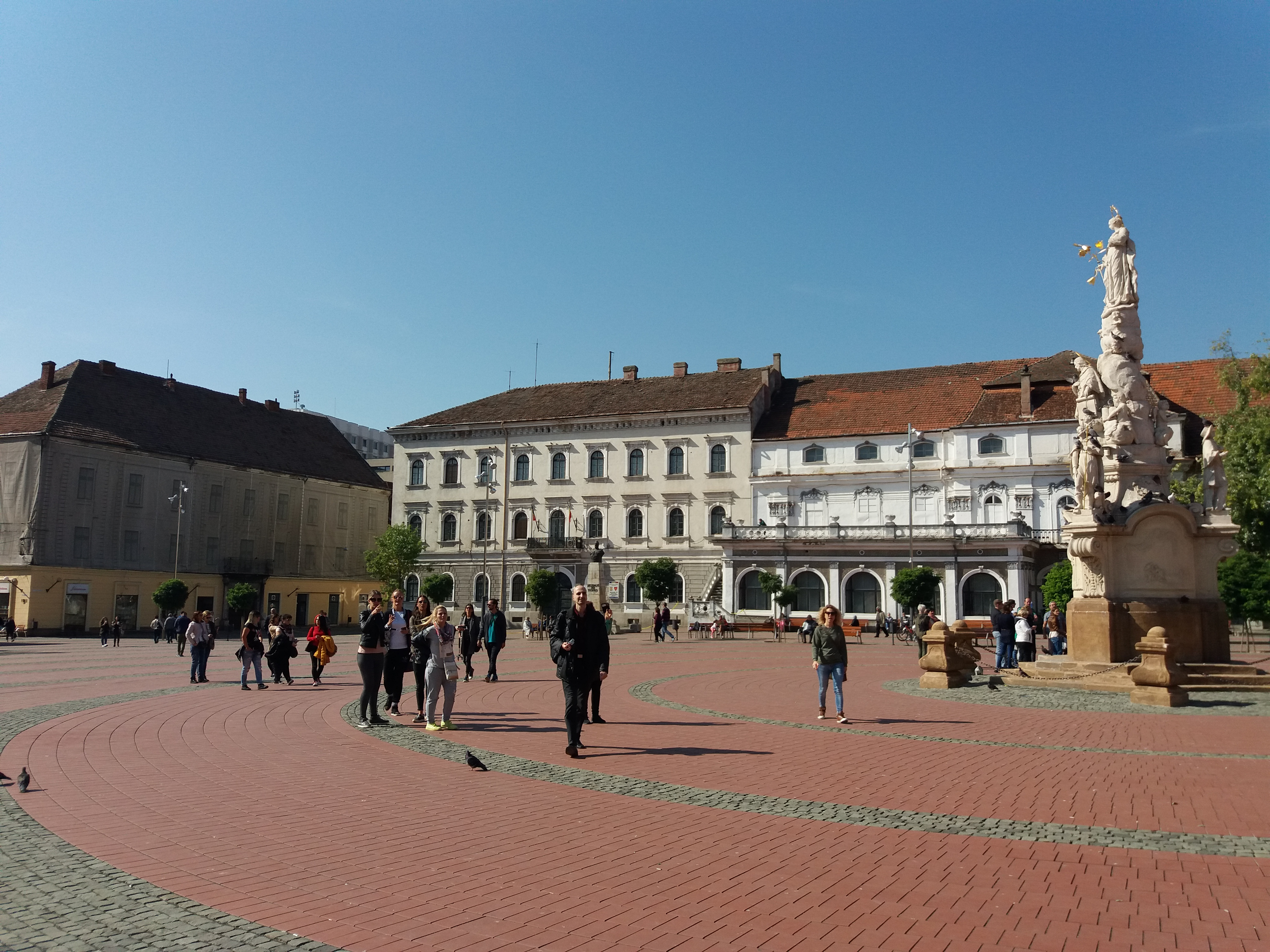 Srpski (latinica): Temišvar, Rumunija